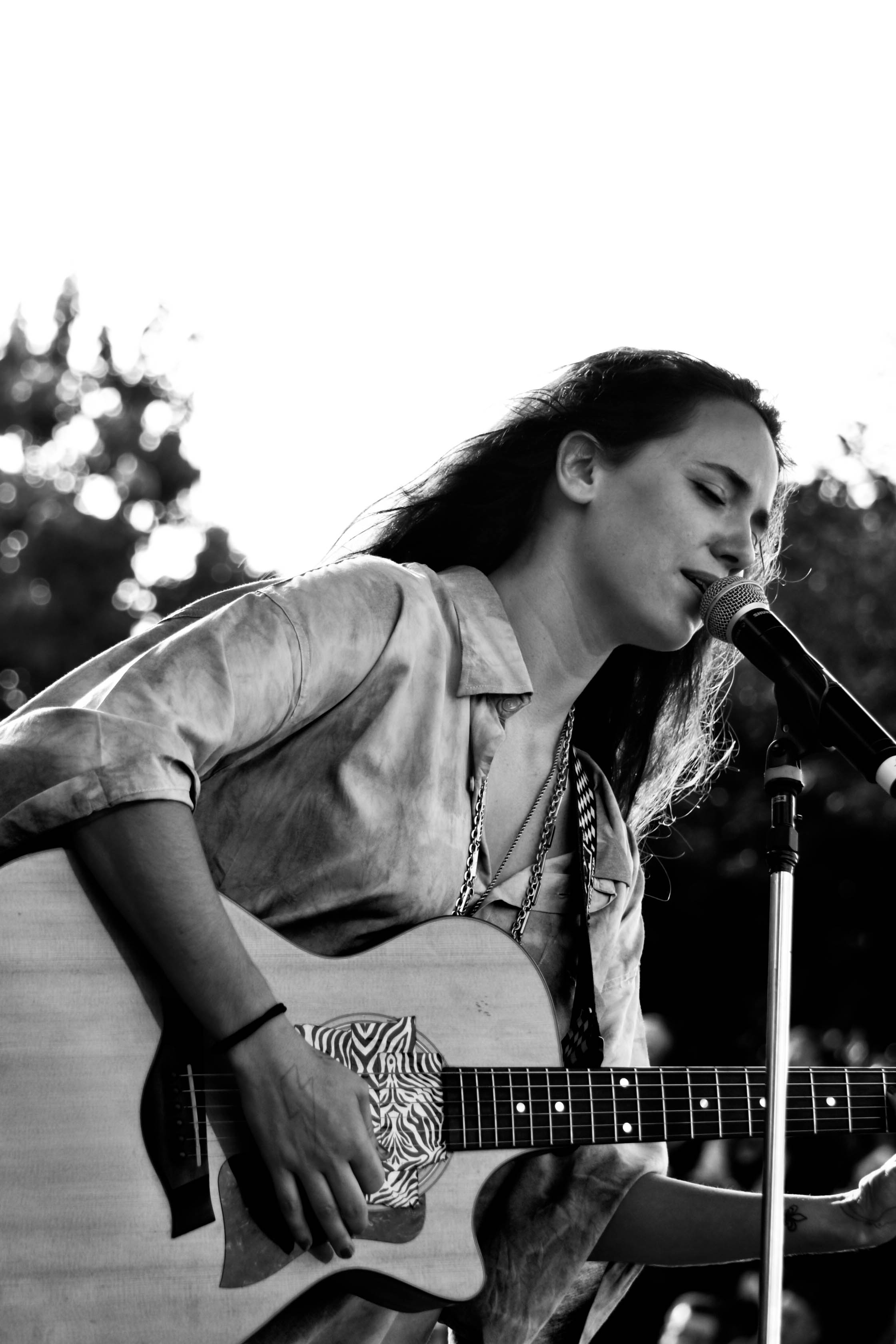 Tiê_PQ Villa-Lobos-108